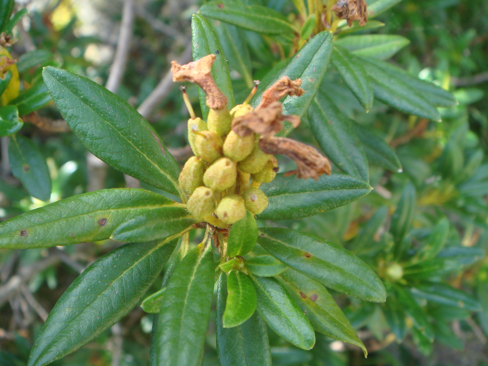 Frutos de Rhododendron ferrugineum Valle de Barrosa, Pirineos , (Huesca), España.